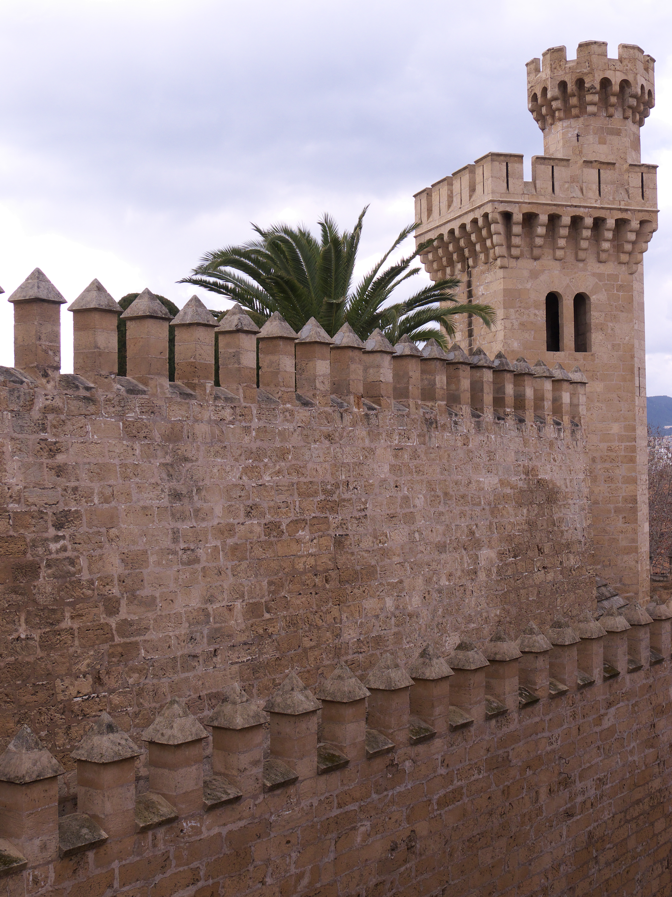 Murallas defensivas del palacio